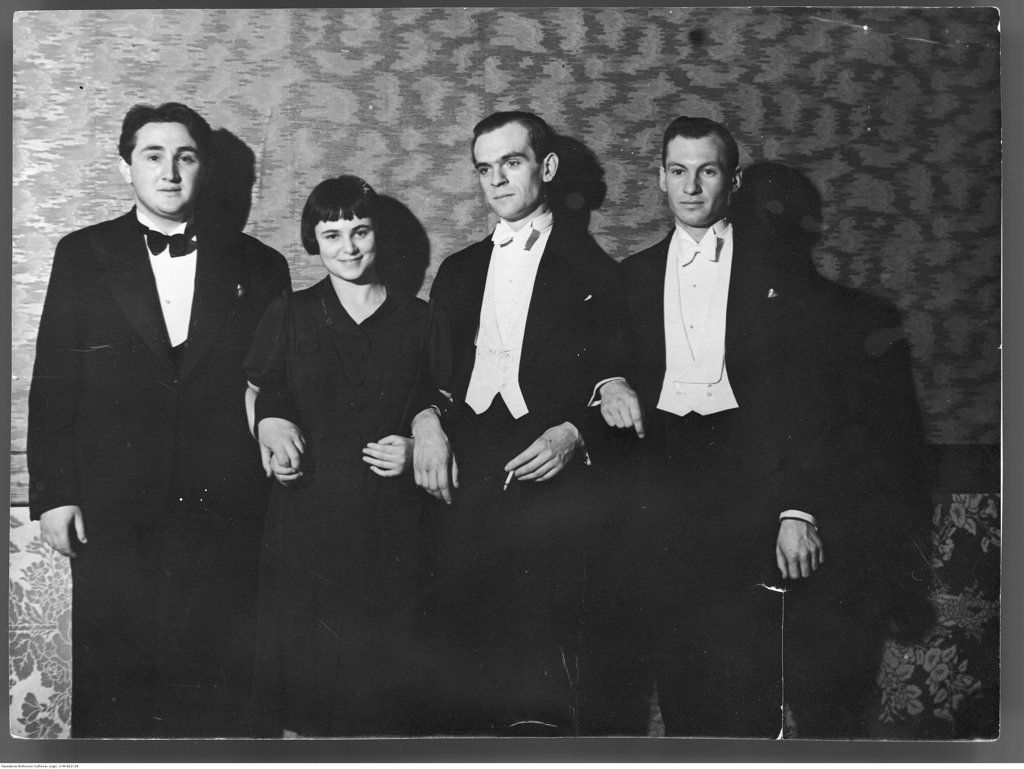 3rden:Chopin Competition laureates (from left) Jakow Zak, Roza Tamarkina, Witold Małcużyński, Lance Dossor